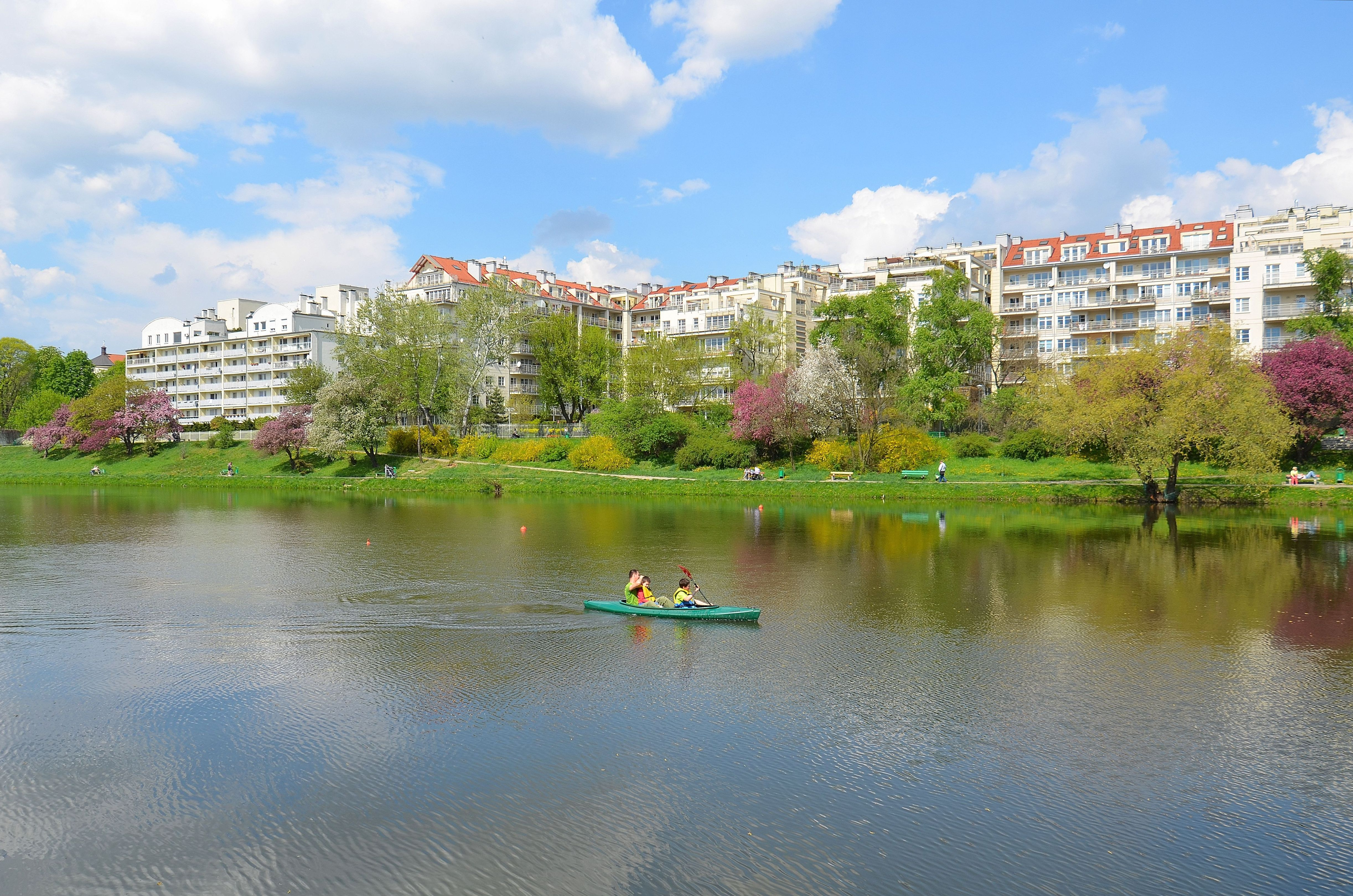 Jeziorko Kamionkowskie w Warszawie